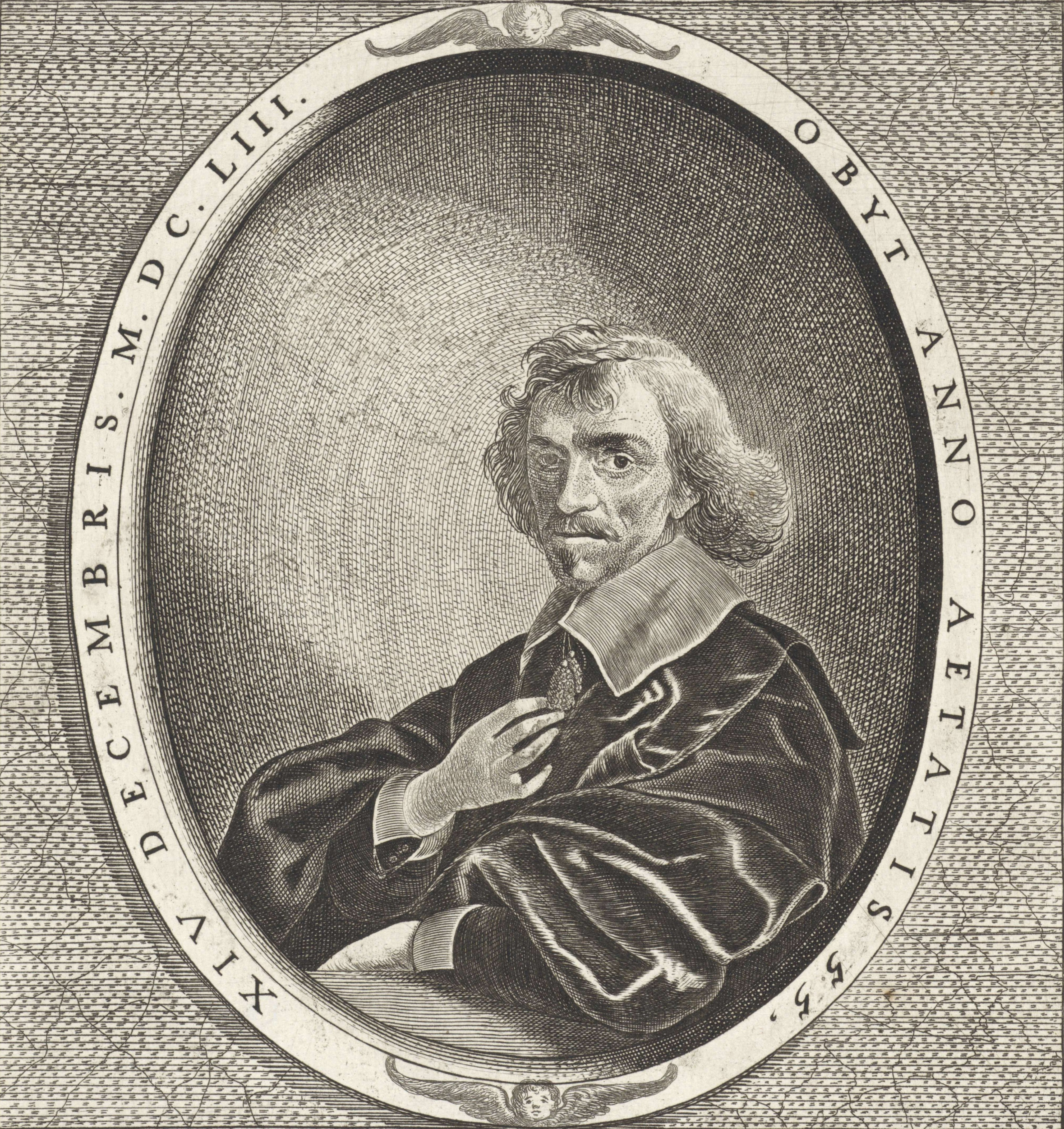 Портрет Паулюса ван де Перре